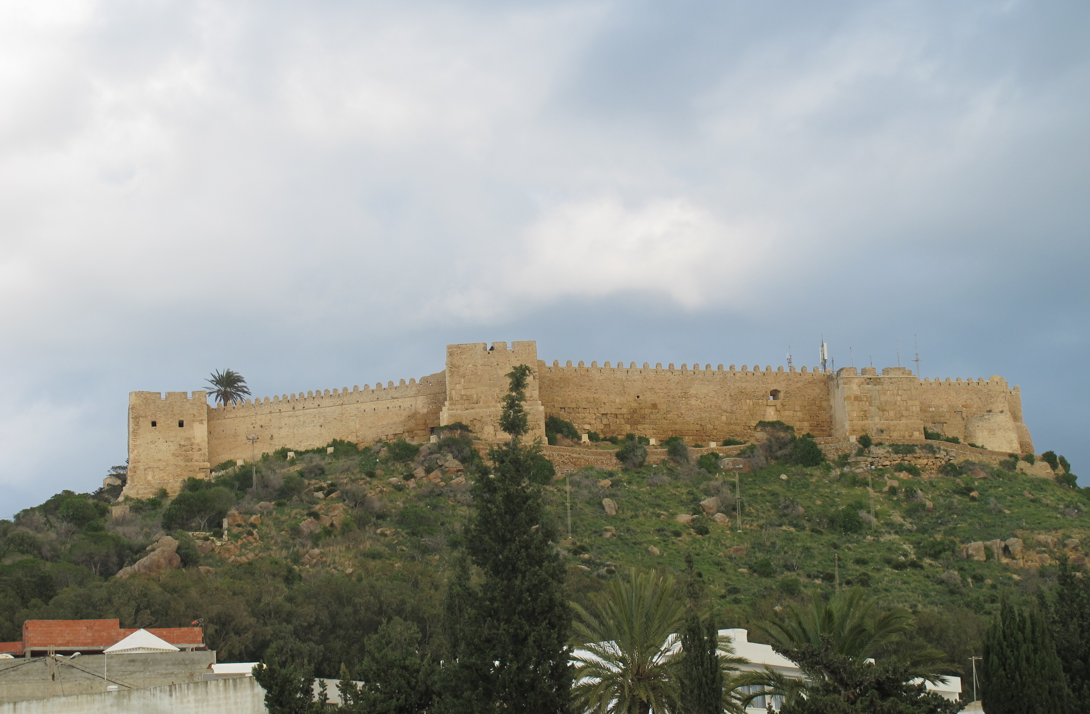 Blick auf das Fort von Kelibia, Tunesien Januar 2015